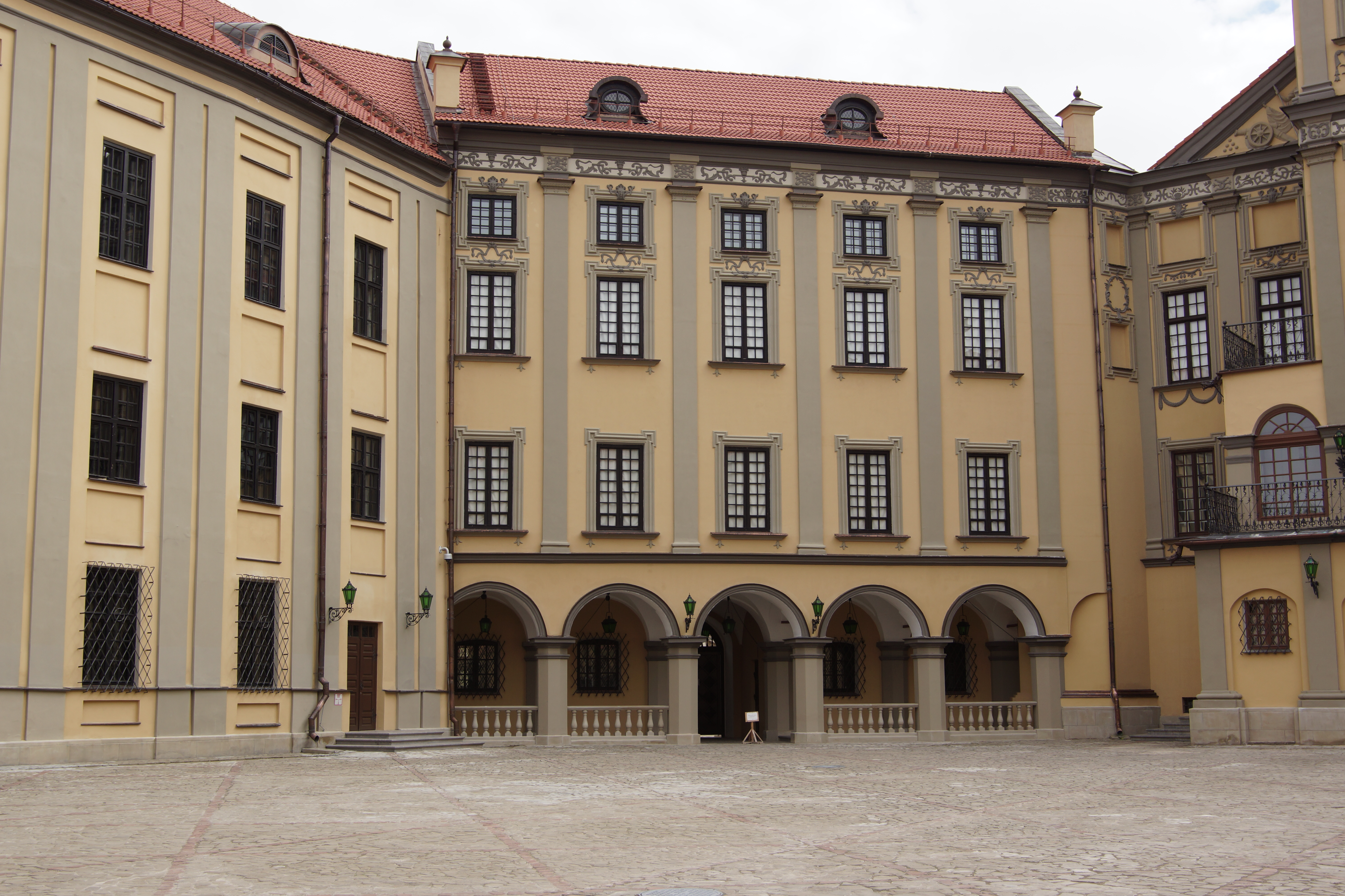 Беларуская (тарашкевіца): Палацава-паркавы ансамбль:замак-палац, паўднёвая і ўсходняя галерэі, камяніца, арсэнал з капліцай, брама, два прыбрамныя корпусы, паўночна-ўсходняя і паўднёва-заходняя галерэі, лядоўня, стайня;абарончыя збудаваньні і мост;тэрыторыя паркаў:Замкавы, Стары, Японскі, Ангельскі, Новы;водная сыстэма:Дзікі, Замкавы, Бэрнардынскі ставы. г. Нясьвіж This is a photo of Belarusian heritage monument. Reference number: 610Г000466 ( WLM)